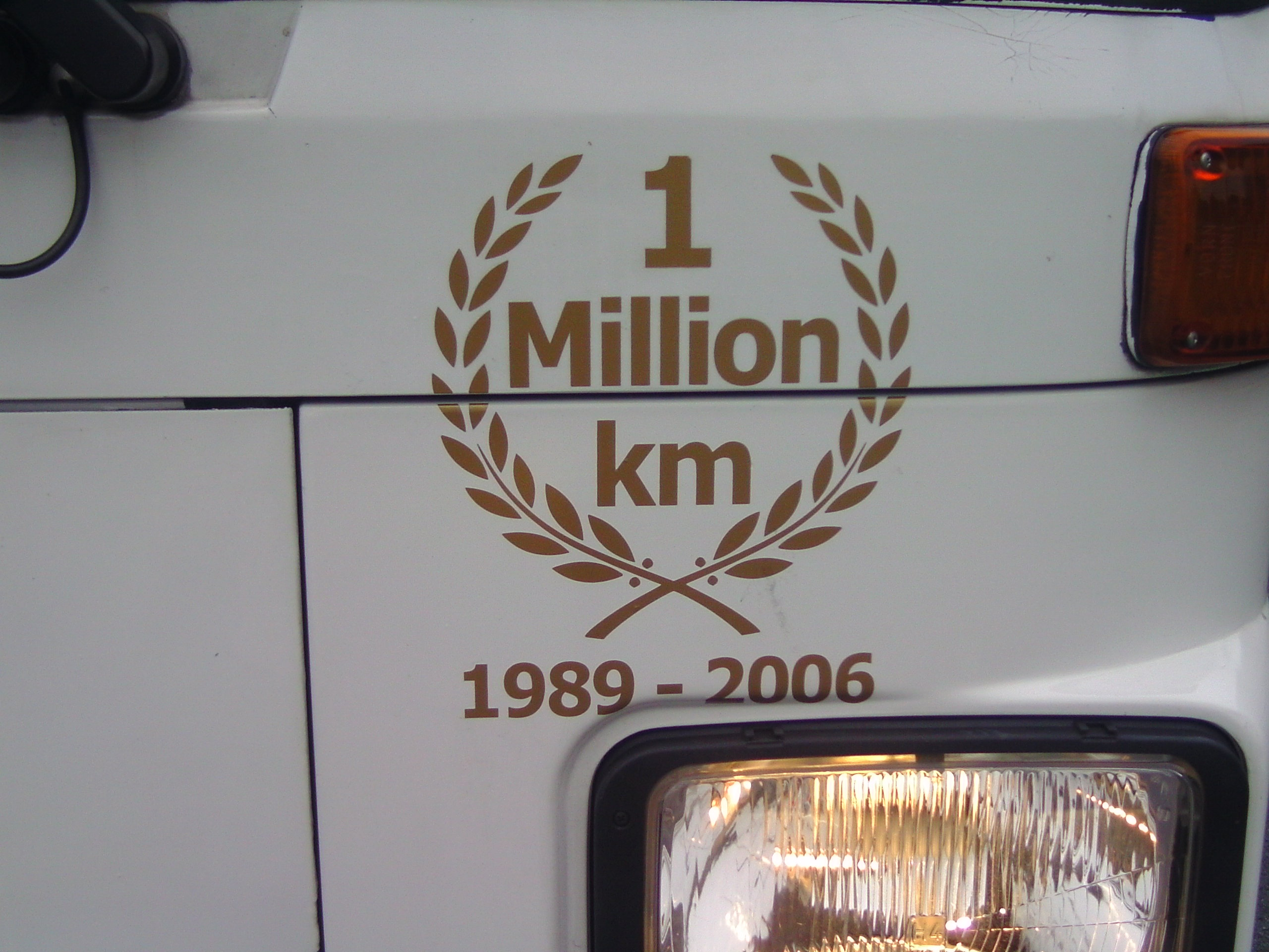 1.000.000km Pickerl am Obus 219